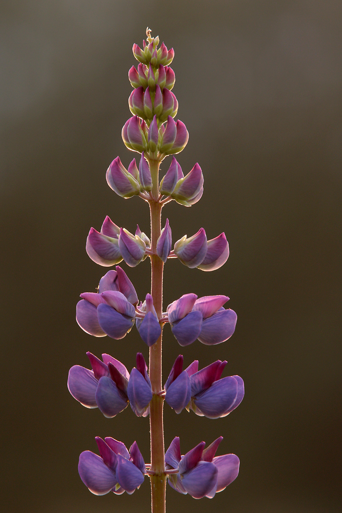 Vielblättrige Lupine in der Nähe des Ilkerbruchs